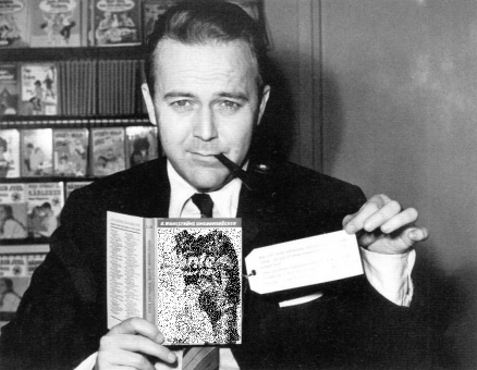 Bengt Linder 1966, med den första Dante-boken.